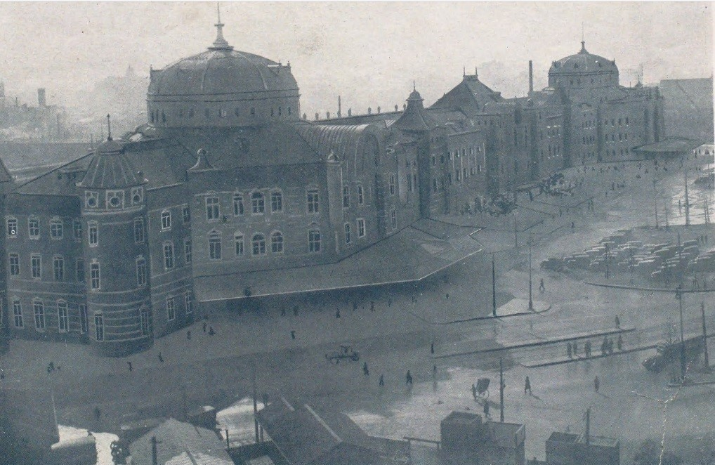 東京駅左側